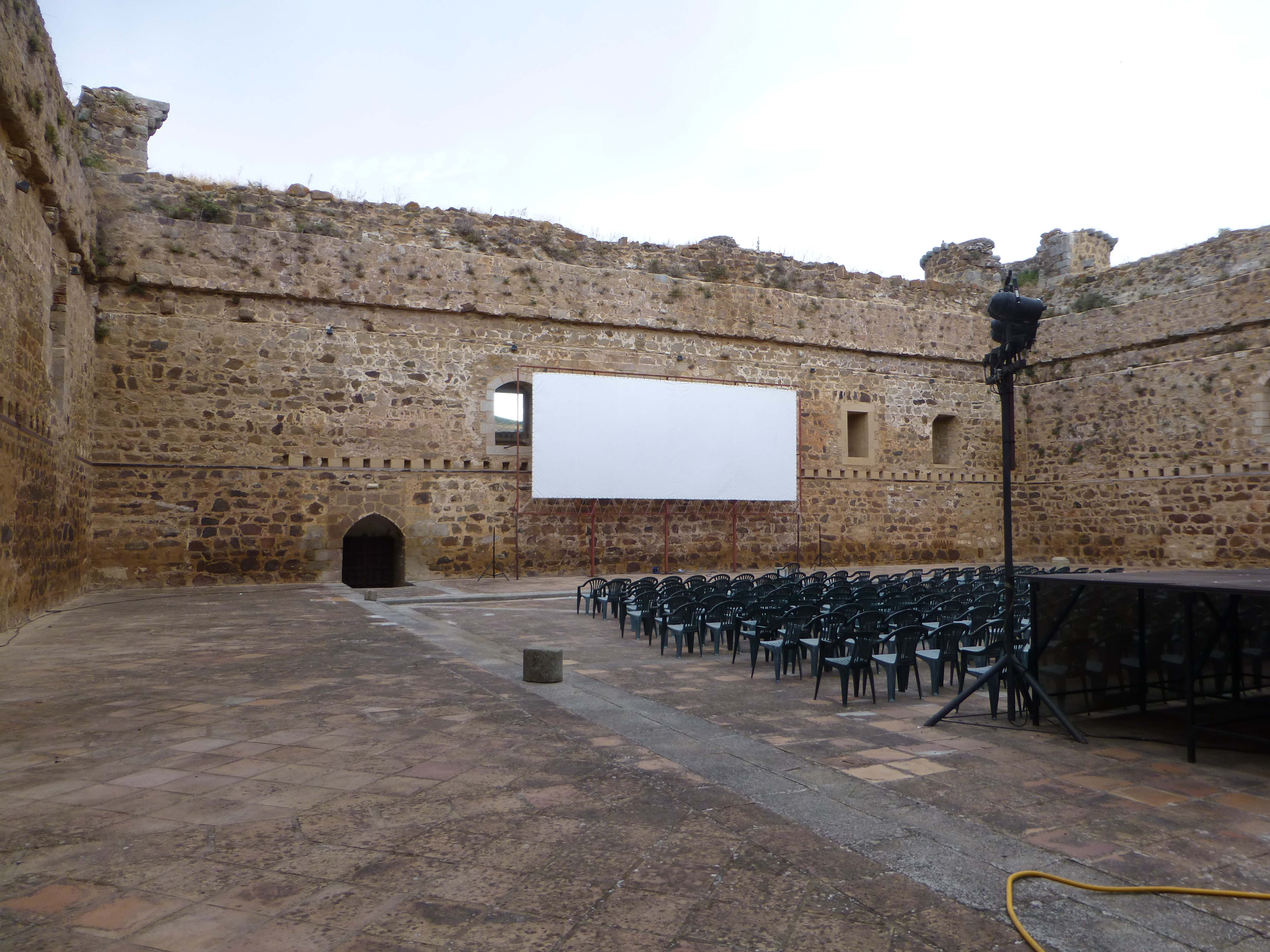 Castillo. Patio de armas. El Barco de Ávila, Castilla y León, España.